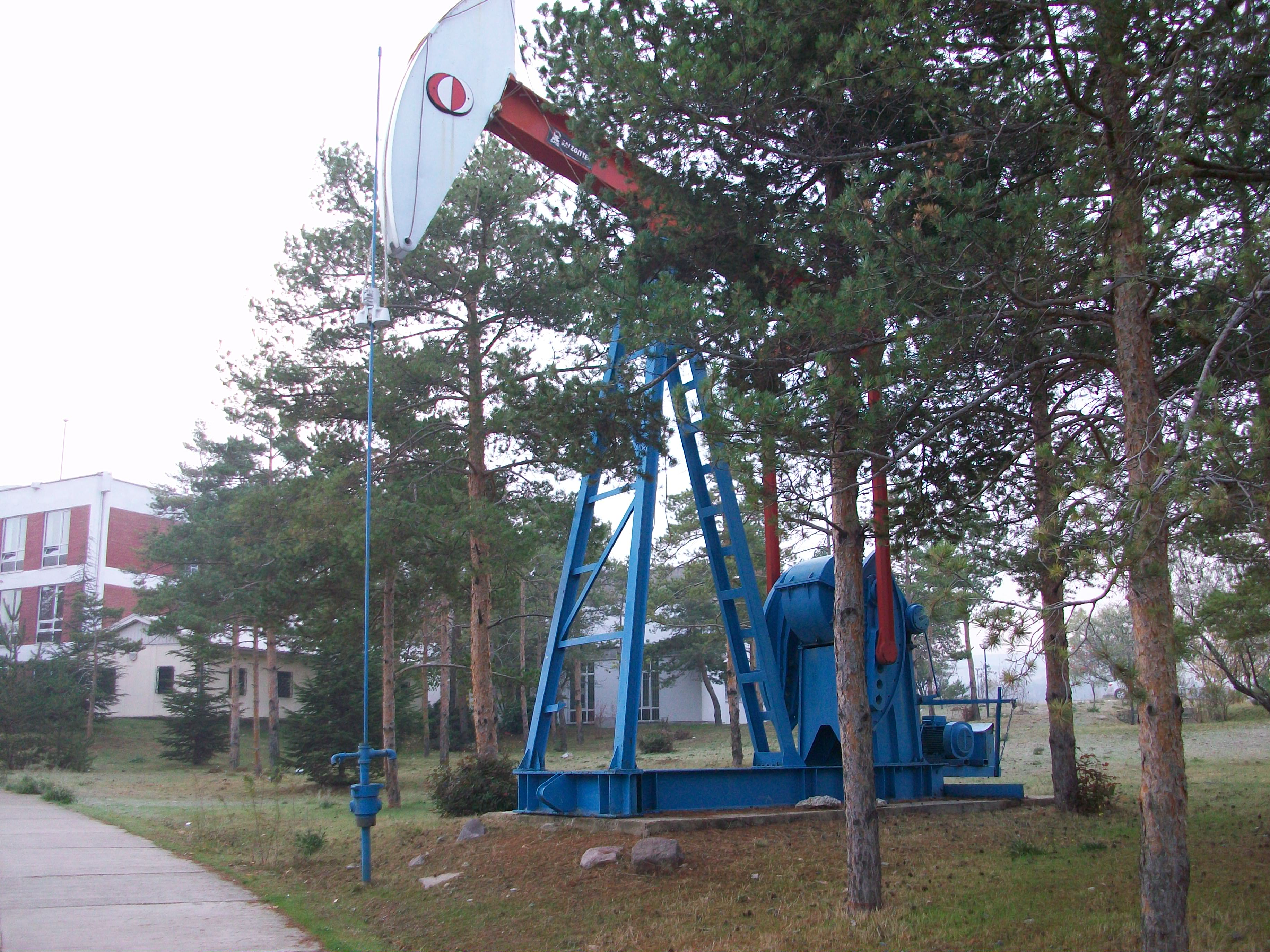 ODTÜ Petrol Mühendisliği Bölümü.